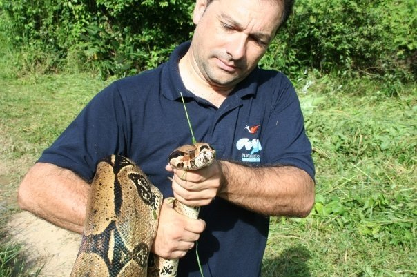 Guillem Chacon amb una Boa constrictor a Veneçuela